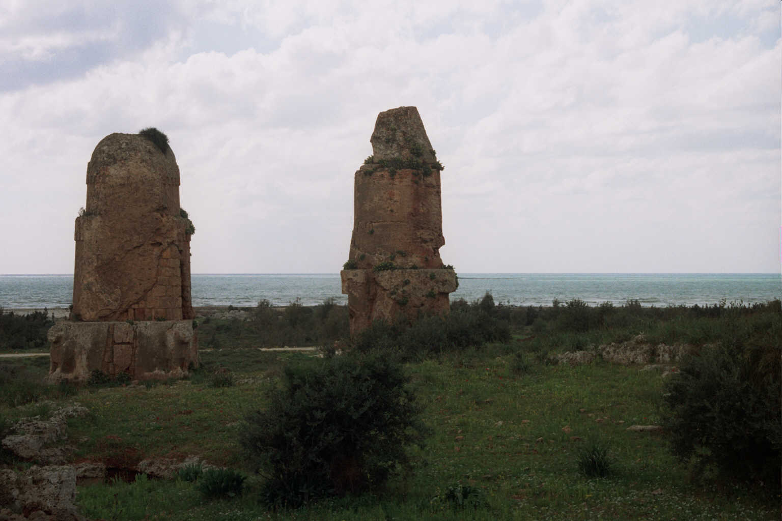 Loris - Viaggio Siria - febbraio 2005